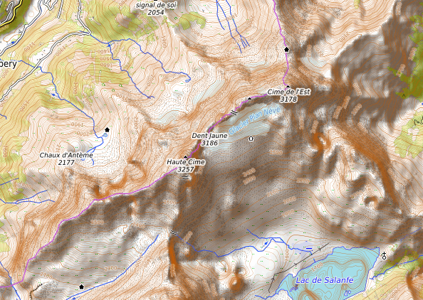 carte réalisée sur umap This map may be incomplete, and may contain errors. Don't rely solely on it for navigation.